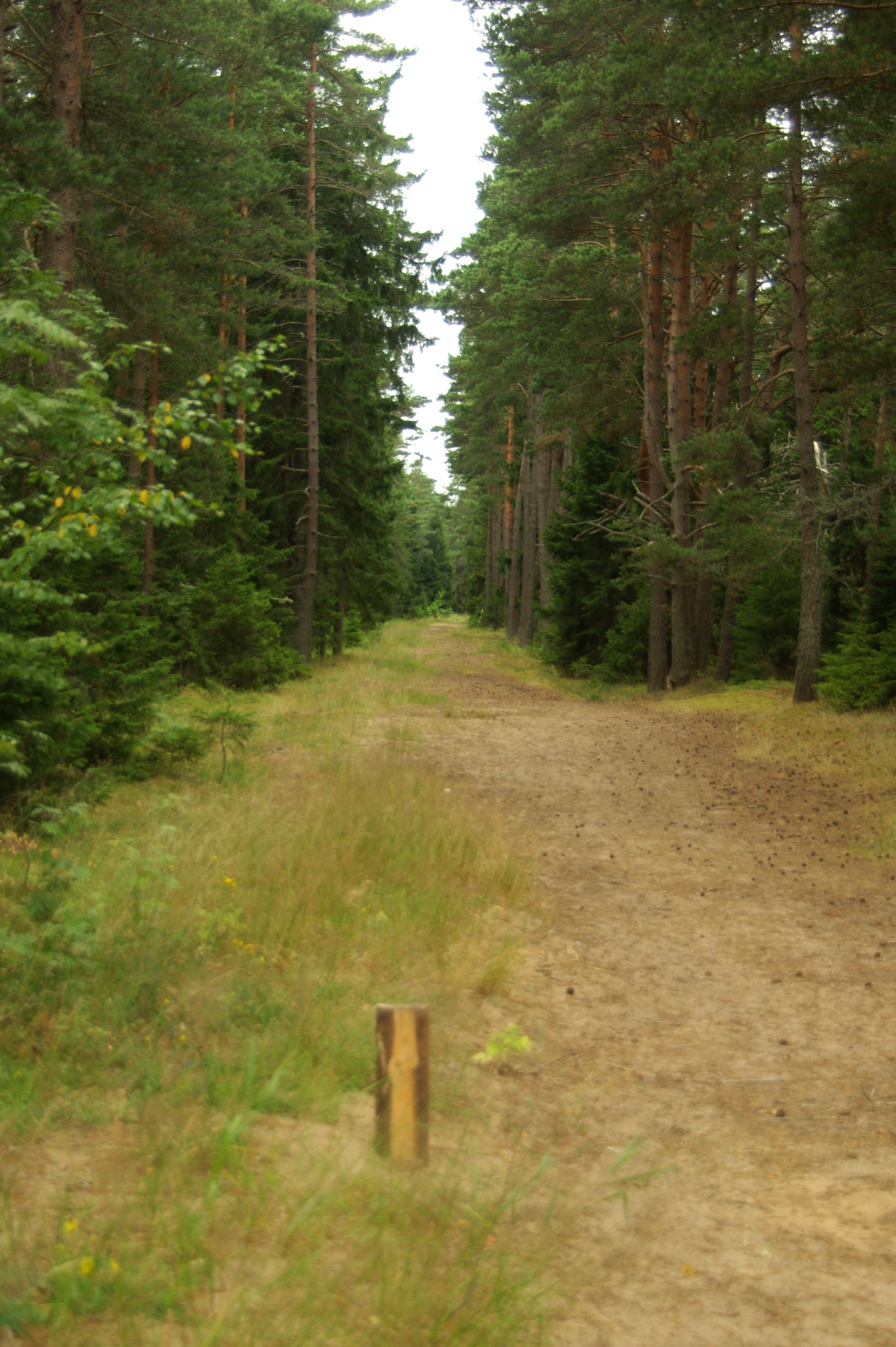 Harju maakond, Tallinna linn, Kesklinna linnaosa Aegna saar